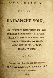 Titelblad van een boek